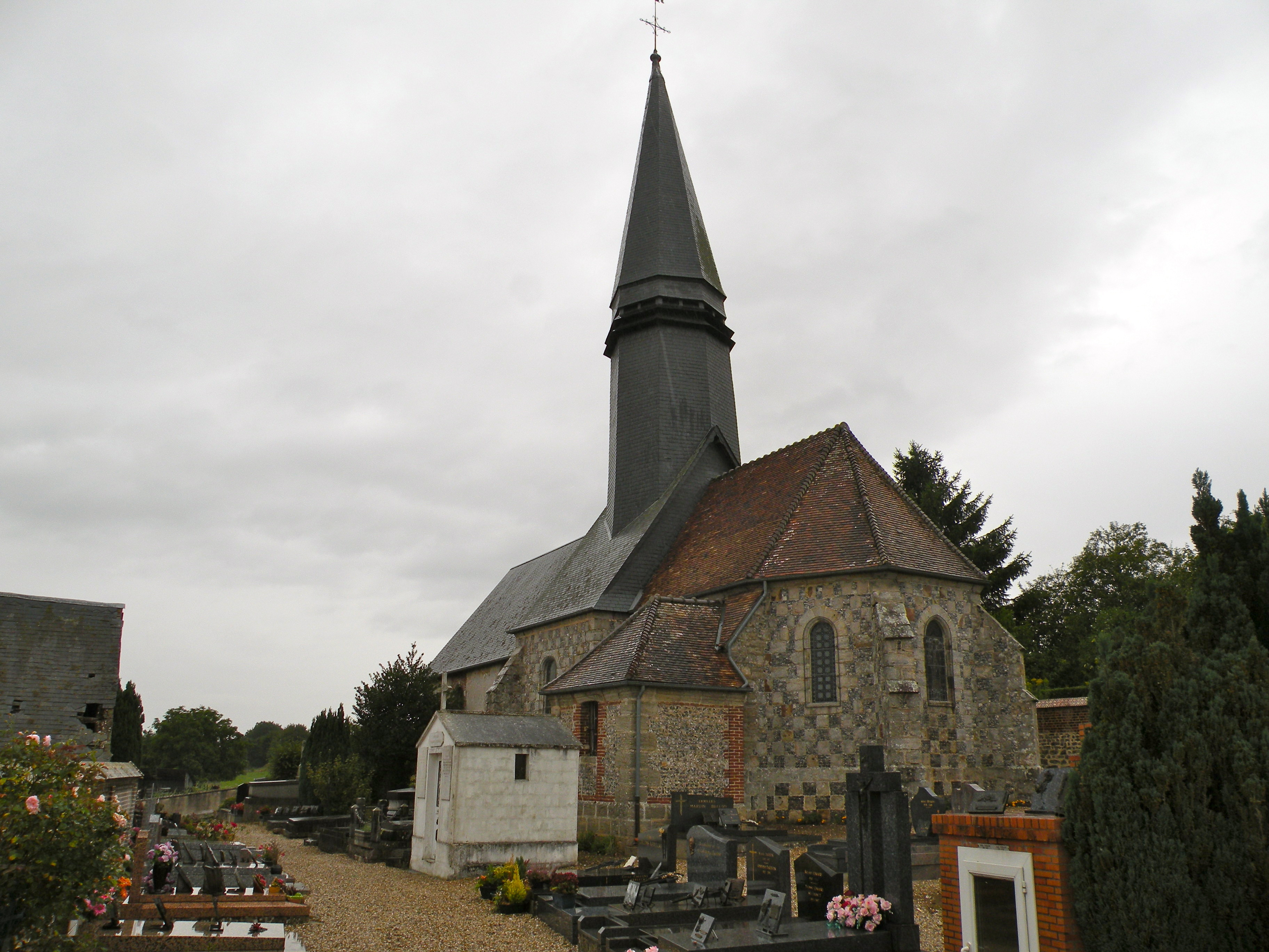 église Saint-Martin de Martincourt